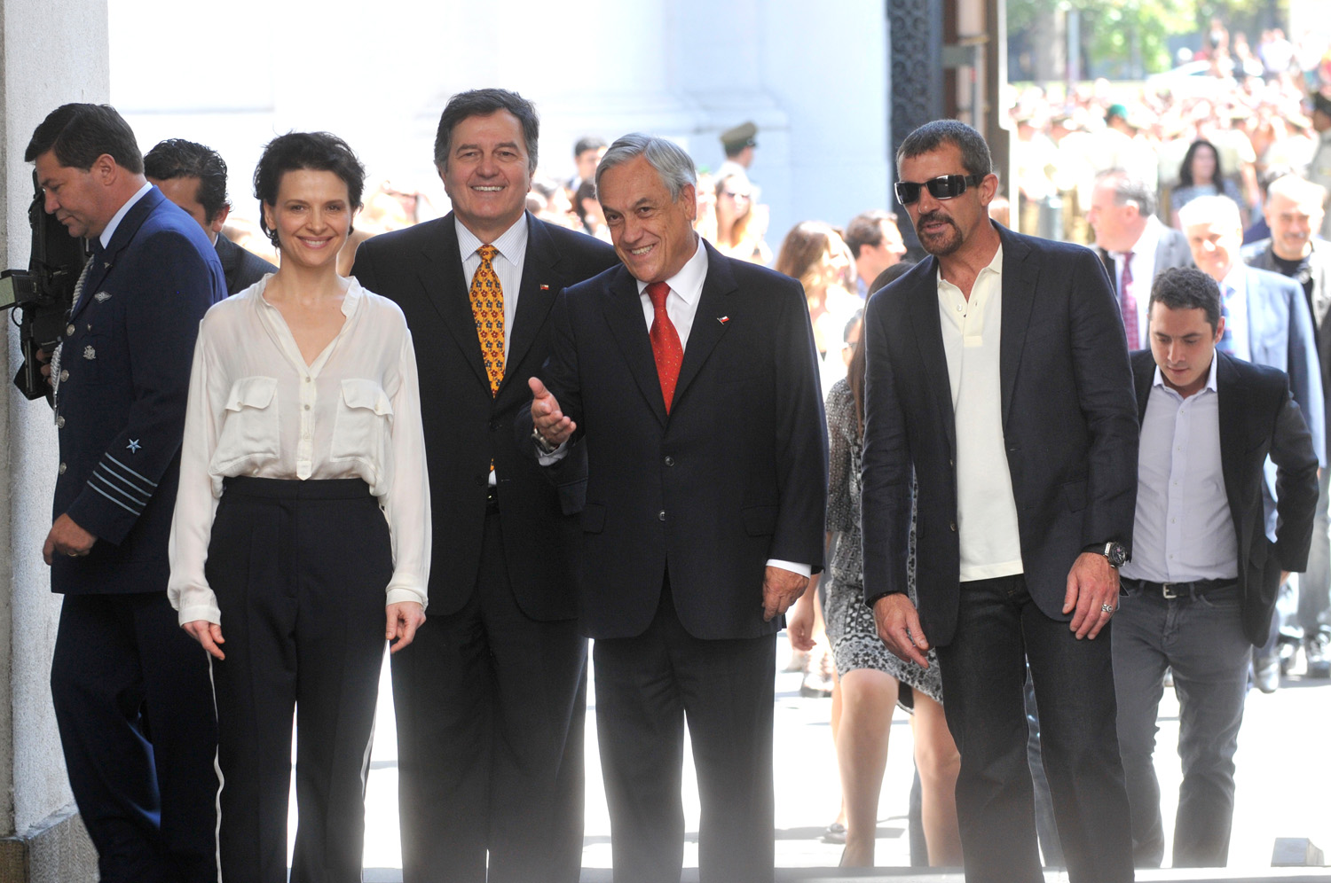 Lanzamiento Película "Los 33"